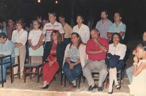 Presença de toda a Comunidade e das Autoridades da época na Santa Missa de lançamento da Pedra Fundamental da Igreja de São Pedro no Valério, em 22 de janeiro de 1991.